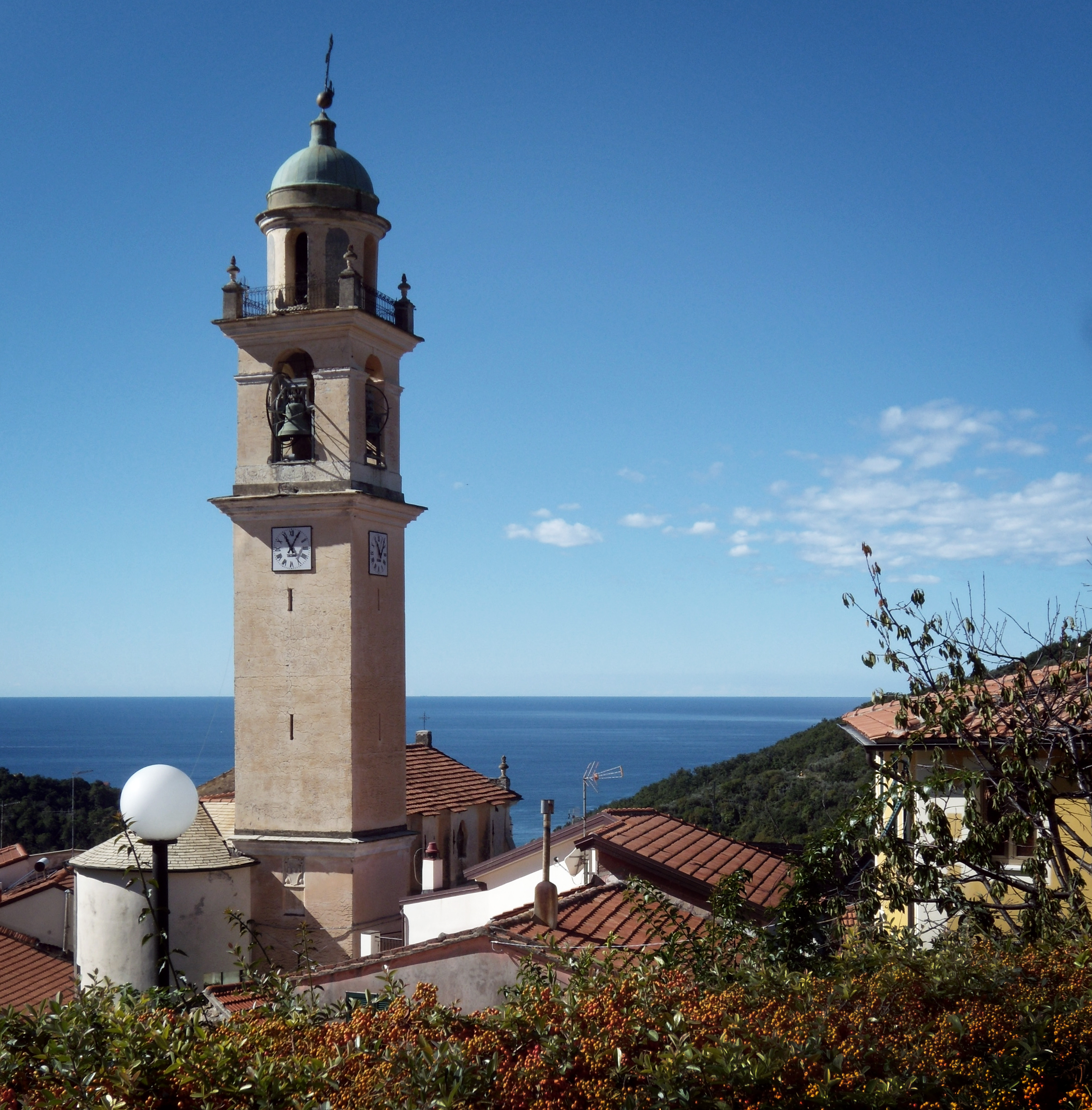 Vista mare di San Saturnino (monegli)